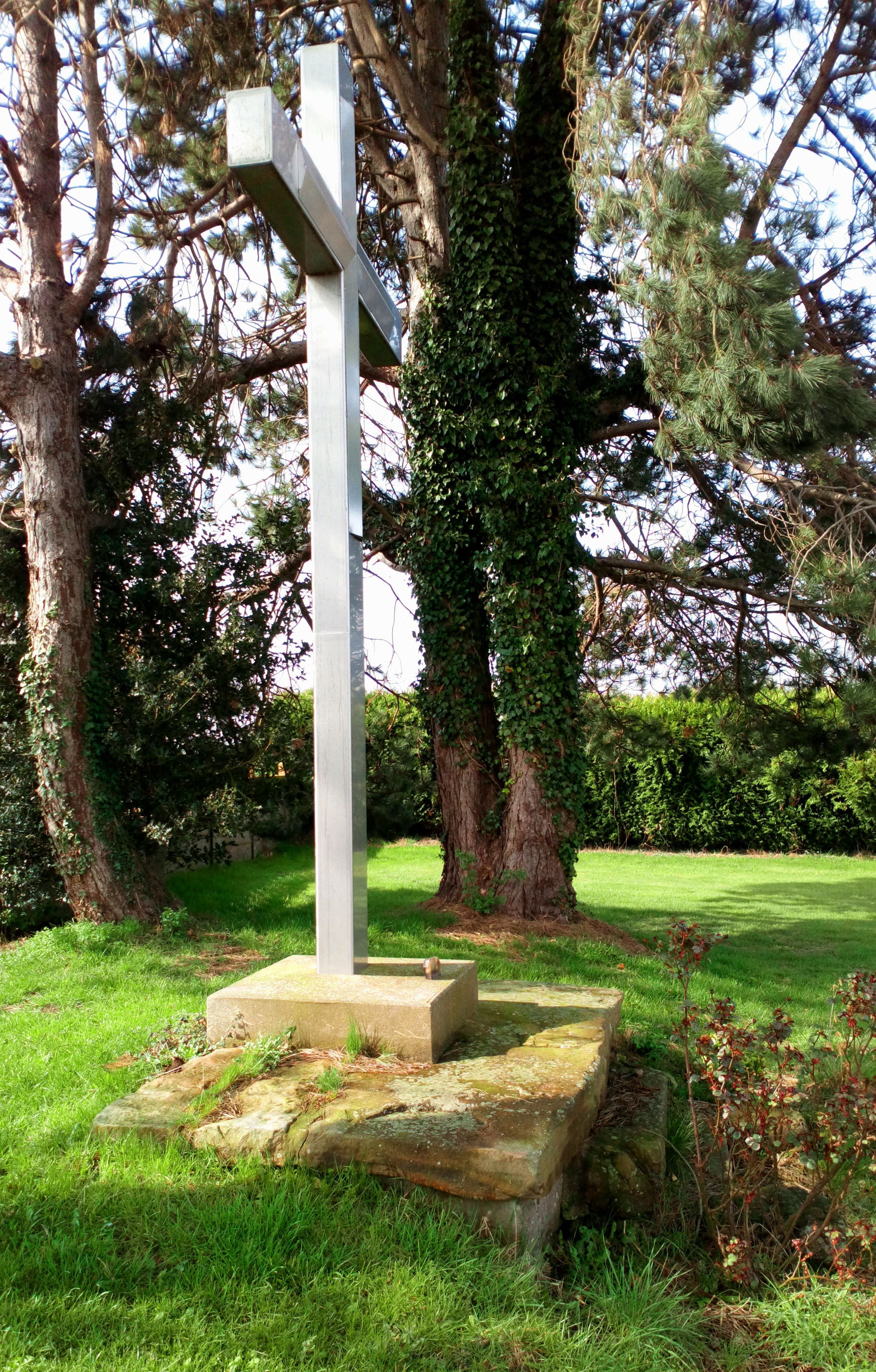 Pierre plate de Norrent-Fontes, mégalithe artésien